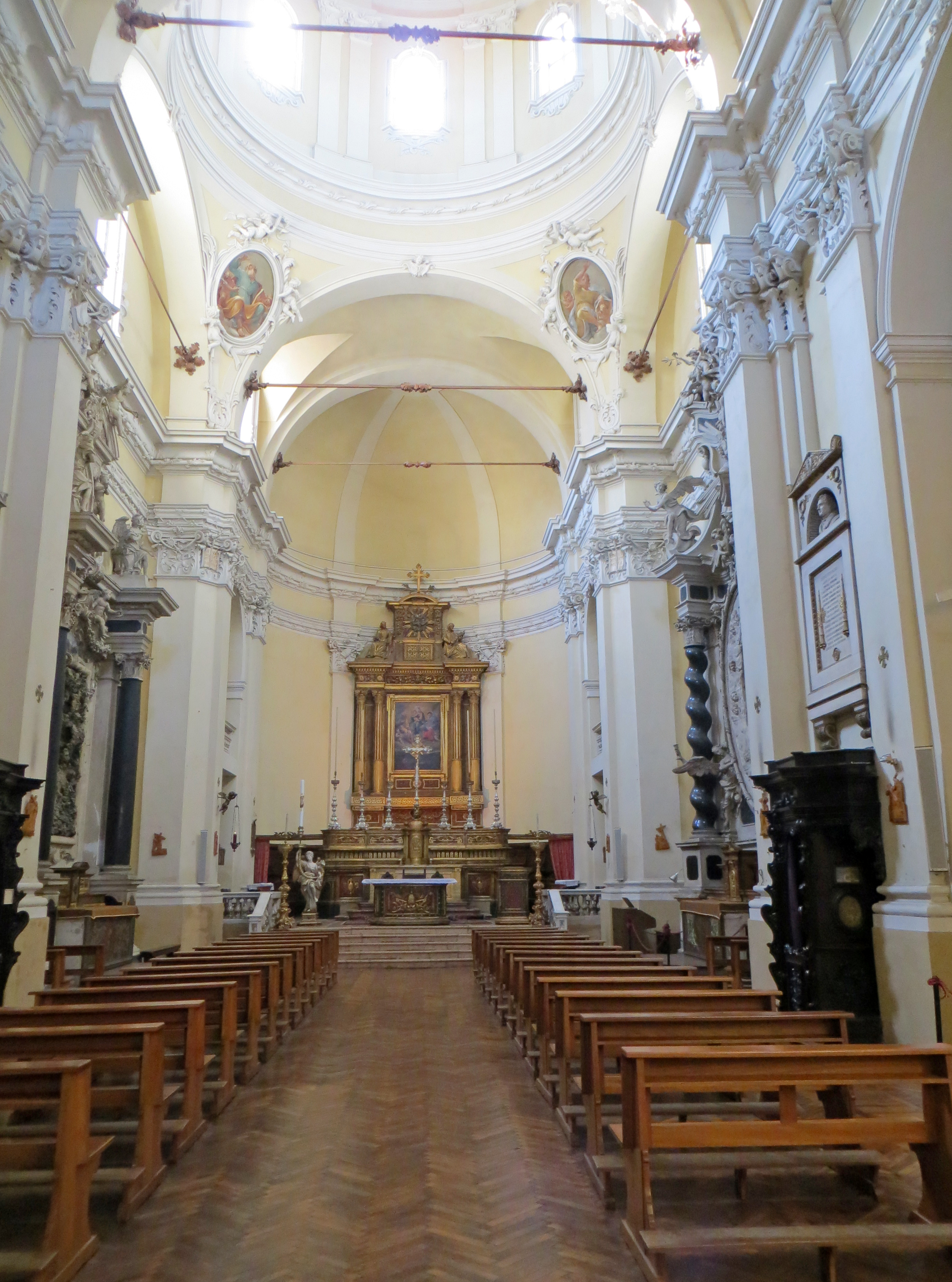 Chiesa di San Pietro (Parma) - navata